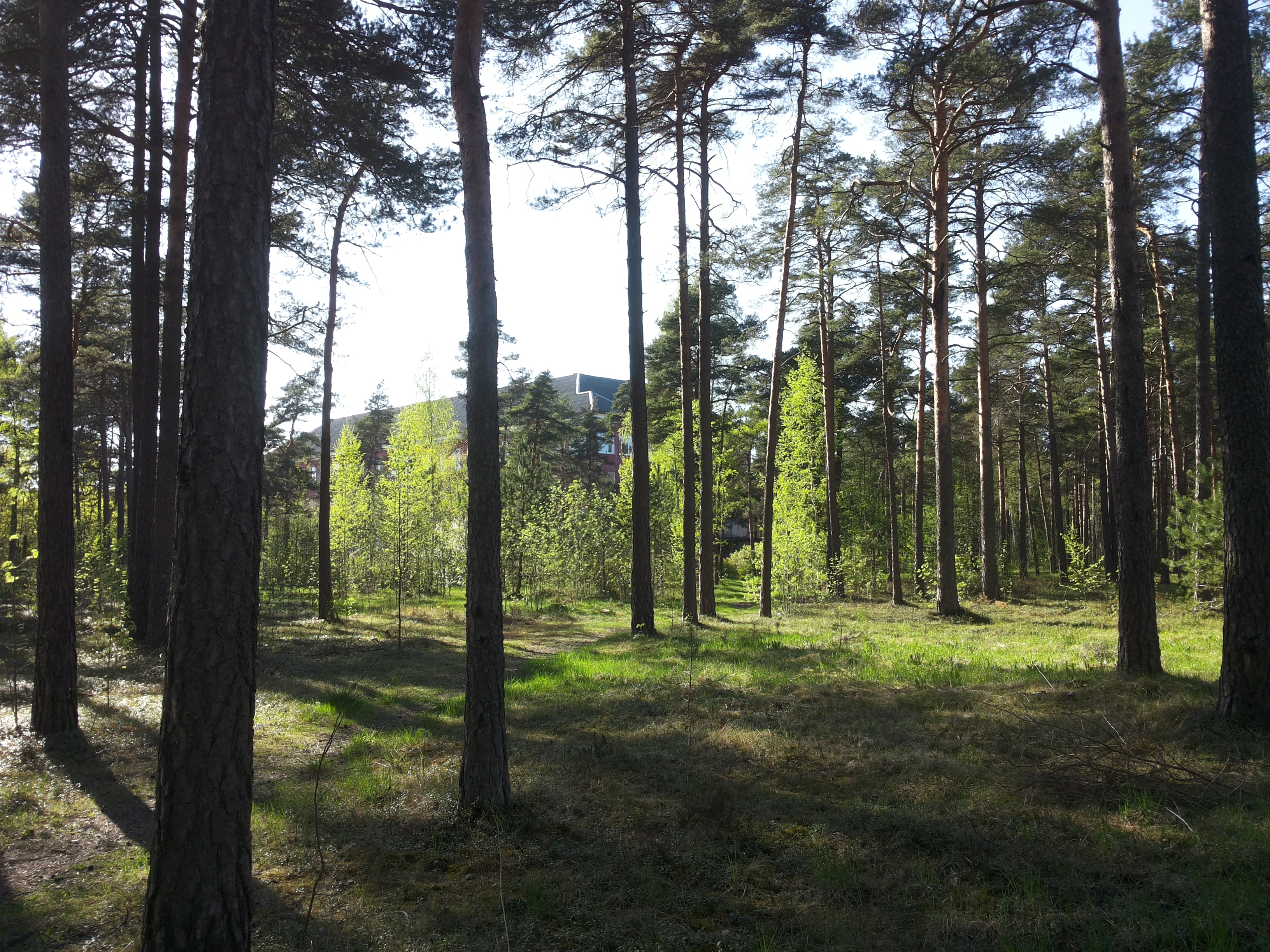 Sanatooriumi parkmets